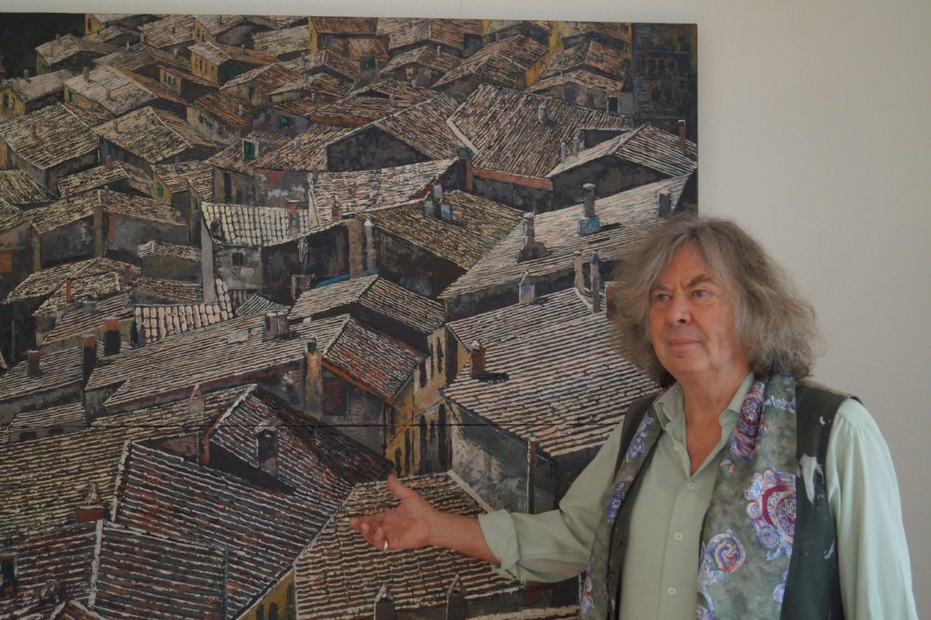 Der Künstler vor seinem Werk